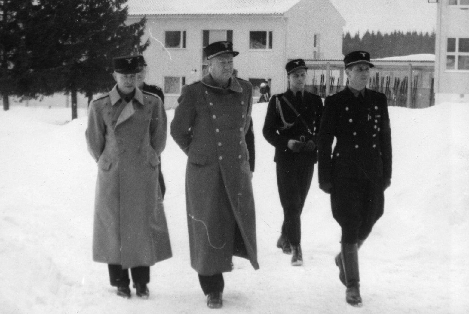 RA/RAFA-3309/U 40A/ /2-9 img279 Nasjonal Samling, forkortet NS, var et norsk politisk parti som ble grunnlagt av Vidkun Quisling i 1933 og ble oppløst ved frigjøringa i 1945. Ideologisk fulgte partiet den tyske nasjonalsosialismen tett, og NS ble støtteorganisasjon for den tyske okkupasjonsmakta i Norge under andre verdenskrig.